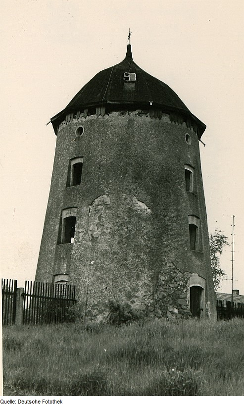 Original image description from the Deutsche FotothekGlaubitz. Holländermühle